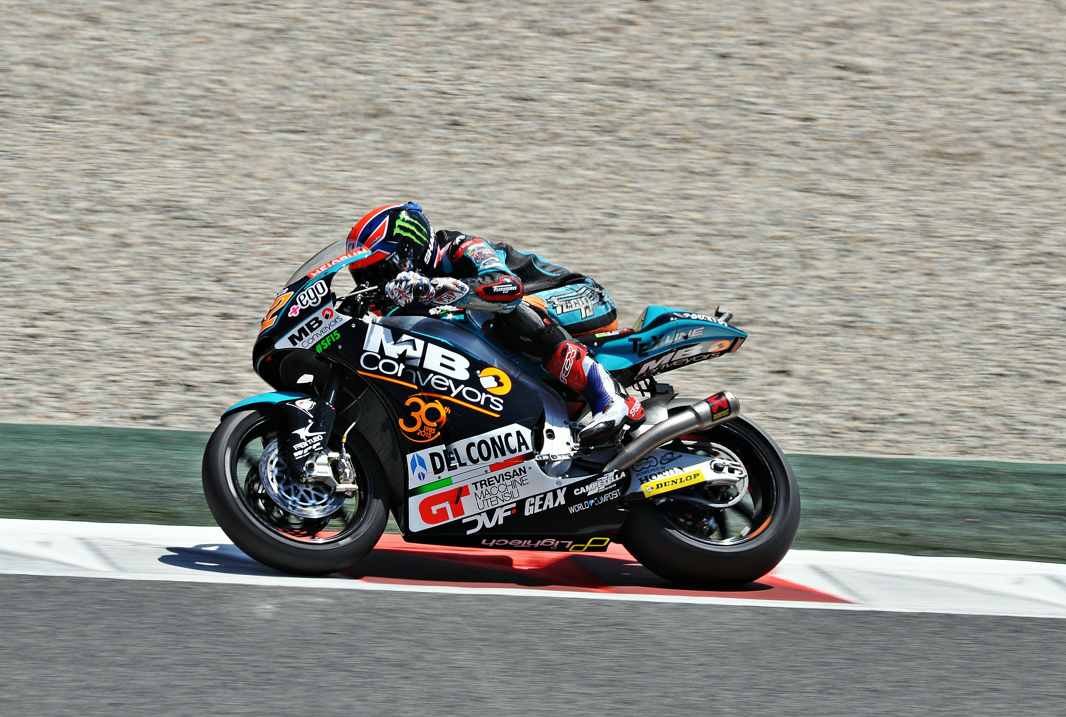 gran premio de cataluña